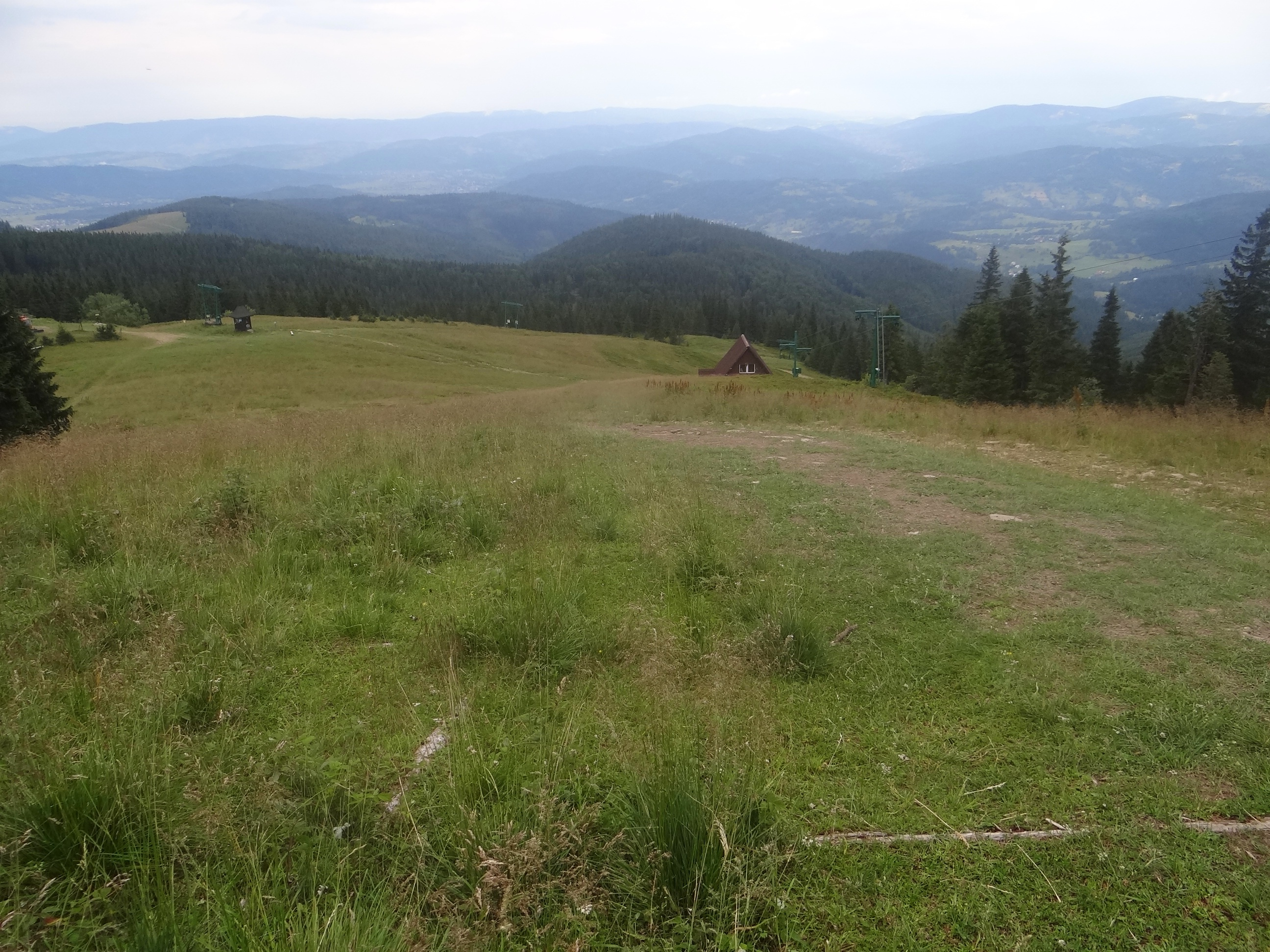 Widok z Hali Słowikowej na Halę Miziową, grzbiet Malorka - Uszczawne Niżne i szczyt Buczynka